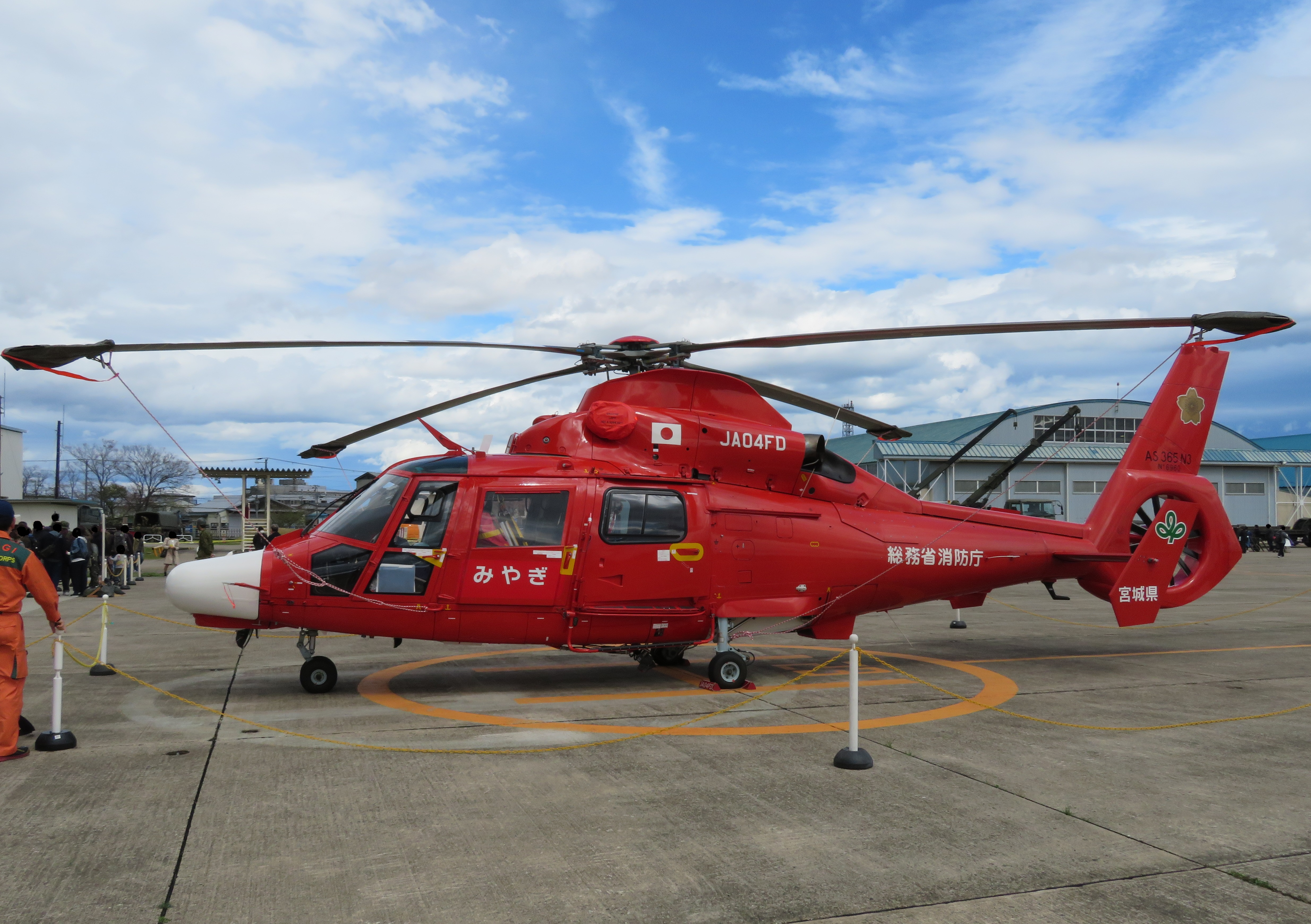 宮城県防災航空隊の消防防災ヘリコプター「みやぎ」